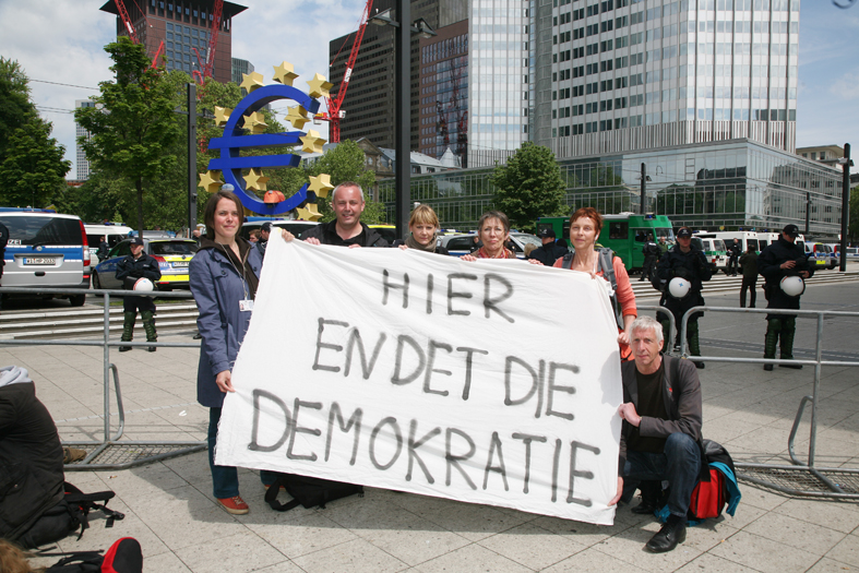 DIE LINKE vor Ort bei den Blockupy-Protesten vom 16. bis 19. Mai 2012 in Frankfurt am Main